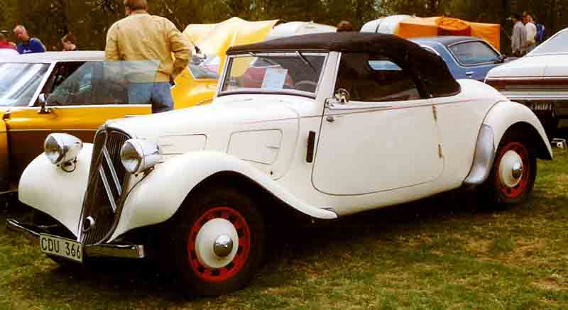 Citroen 11B Cabriolet 1939